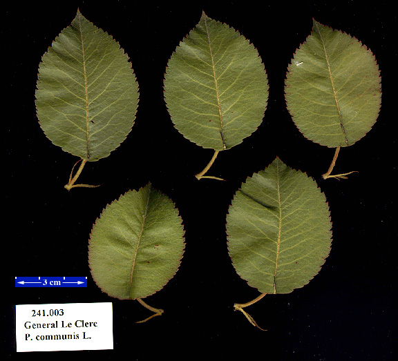 General Leclerc-pyr-leaves.